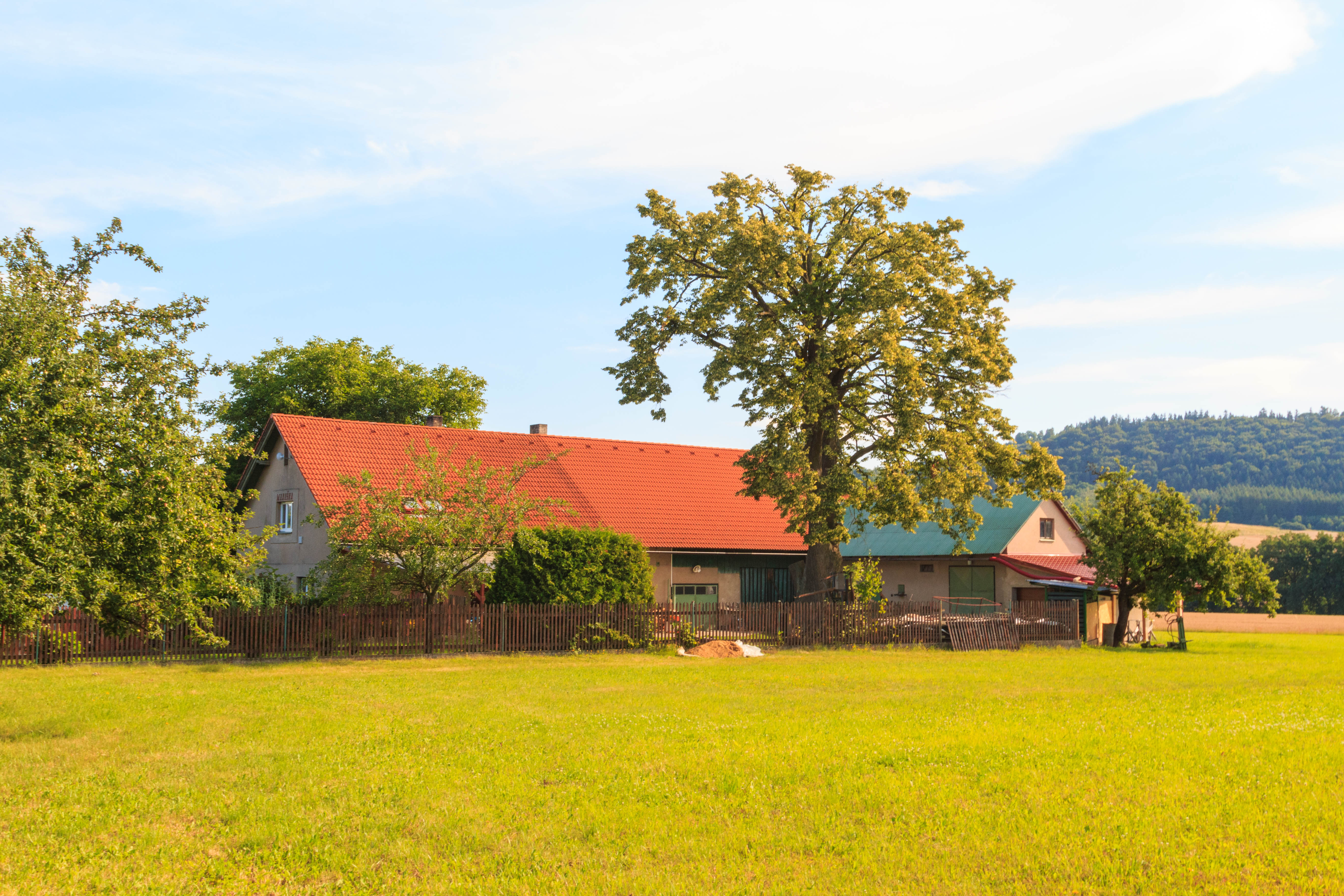 Hařilova Lhotka č. 5